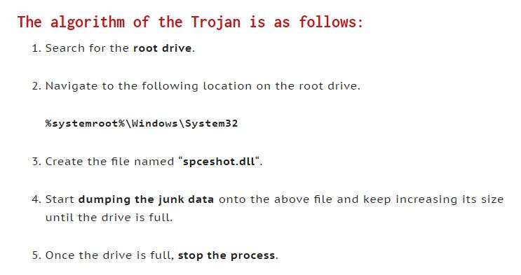 Монгол: space